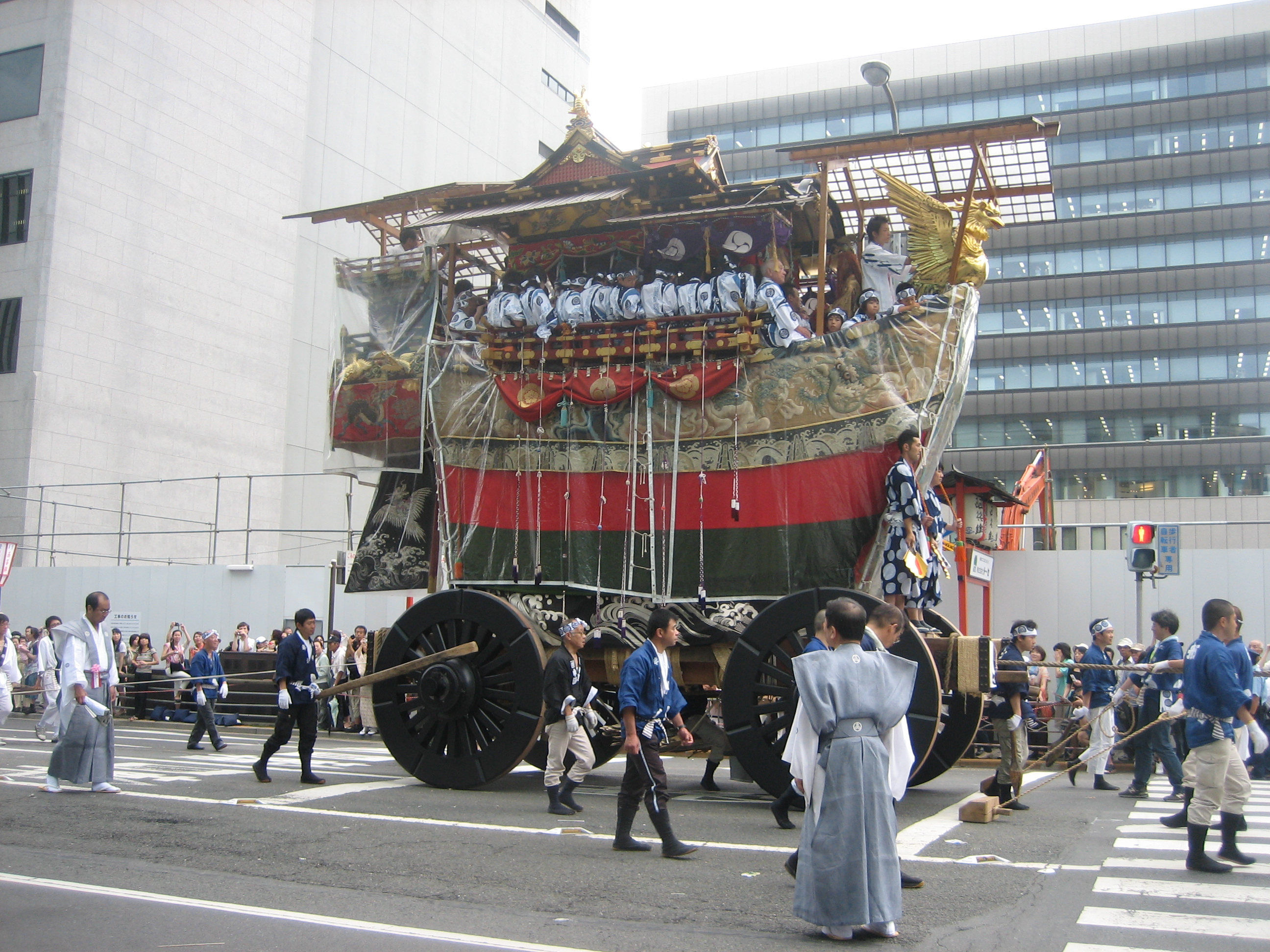 2009年7月17日に京都市で行なわれた祇園祭山鉾巡行の様子。 船鉾。横から撮影。